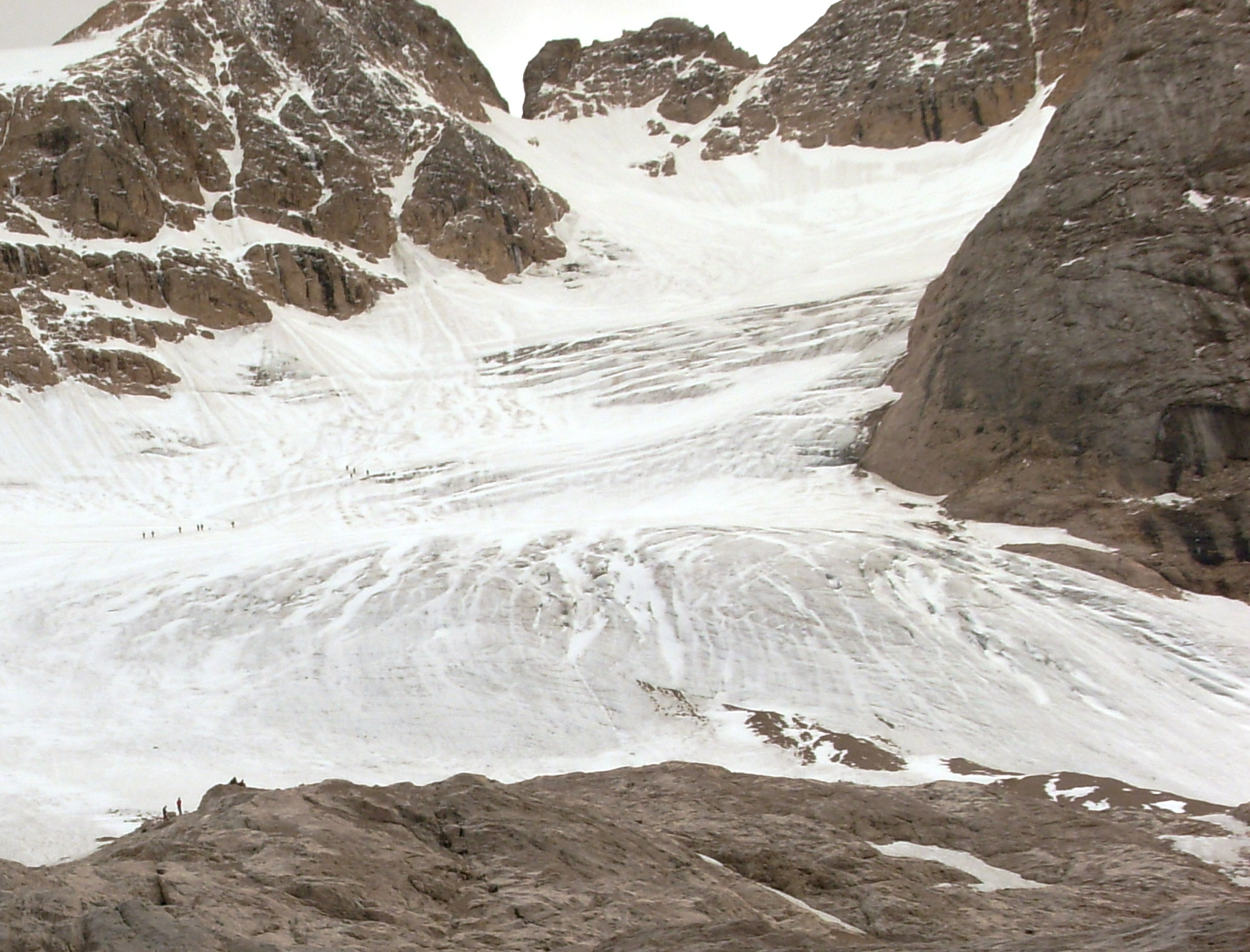 Marmolada glacier/Marmolados ledynas